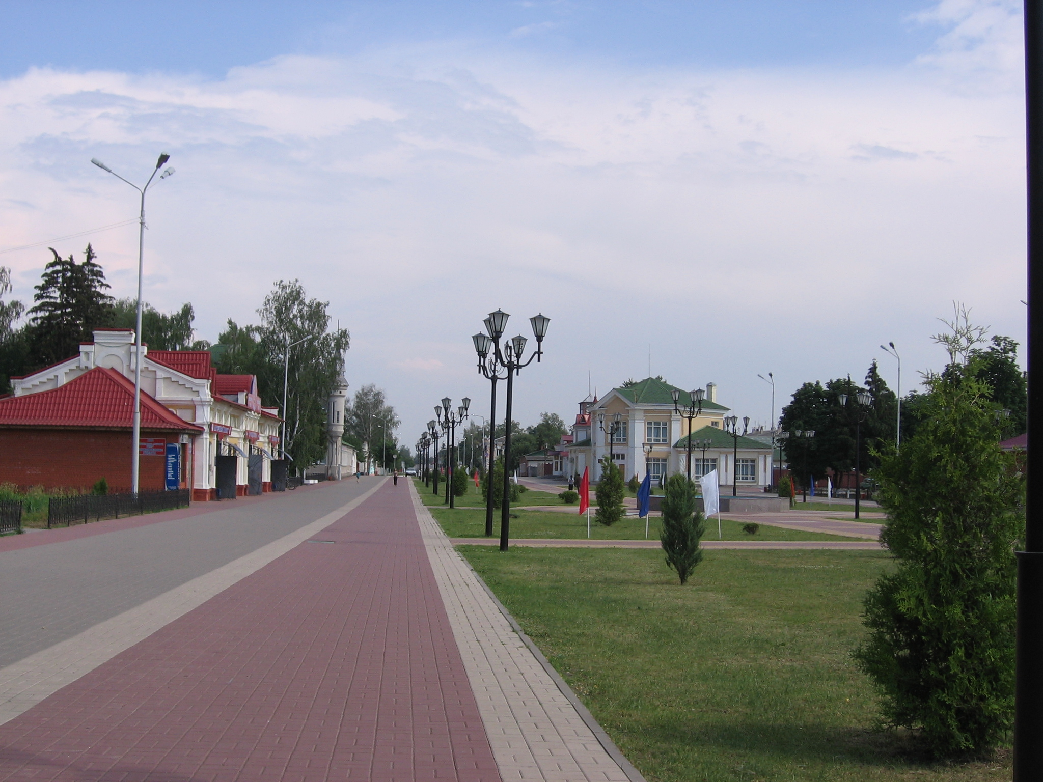 Россия. Белгородская область. Грайворон. Улица Ленина